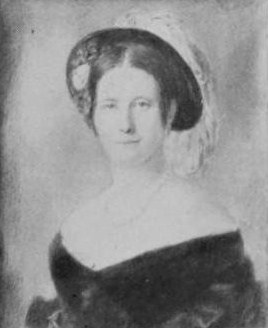 Анастасия Сергеевна Храповицкая, ур. Щербатова (1812—1889), во втором браке Вревская.